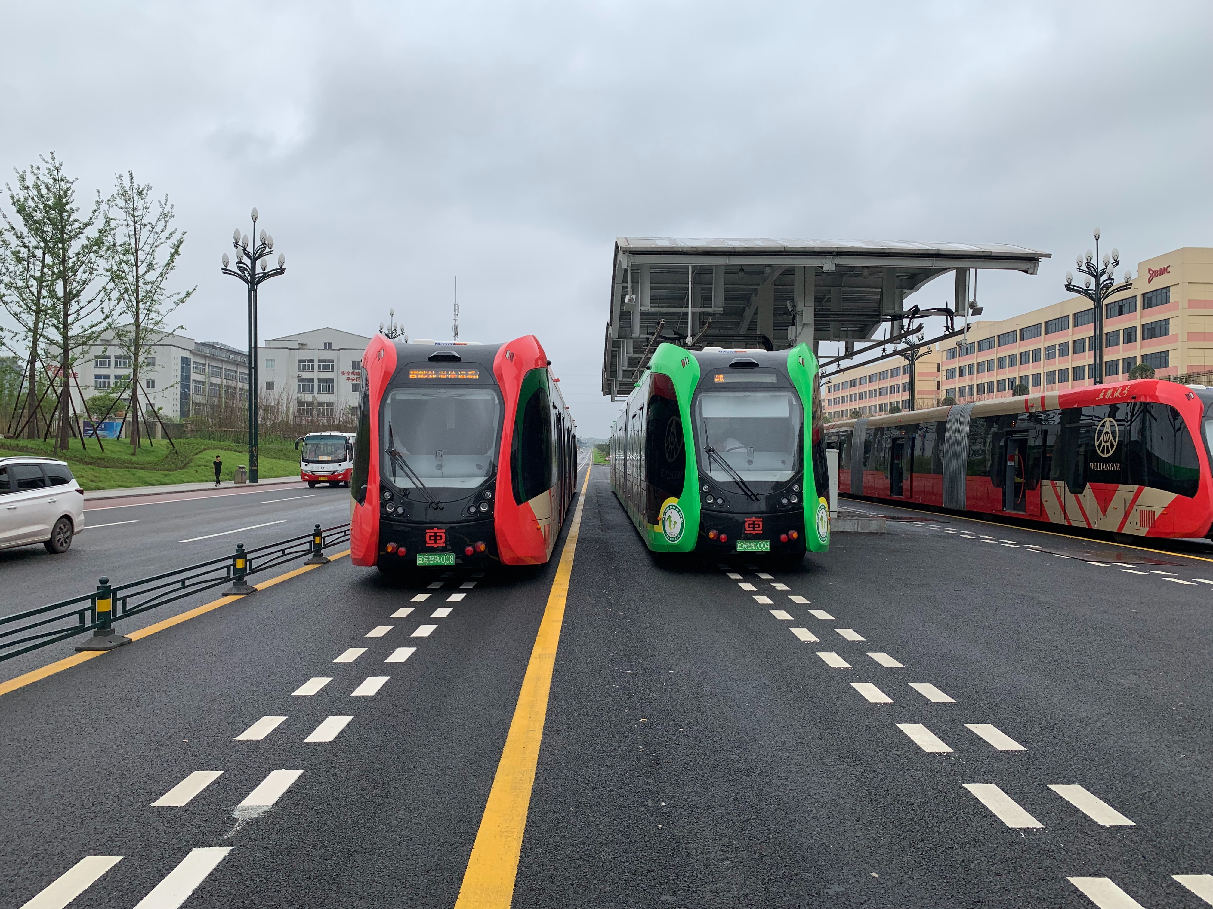 宜宾智轨系统